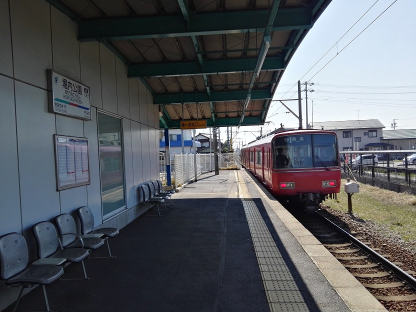 Horiuchikoen station platform